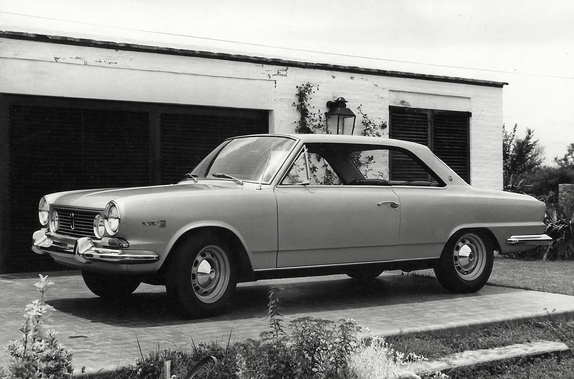 Ika torino 380 1966 vercion pininfarina "industria argentina" foto publicitaria.